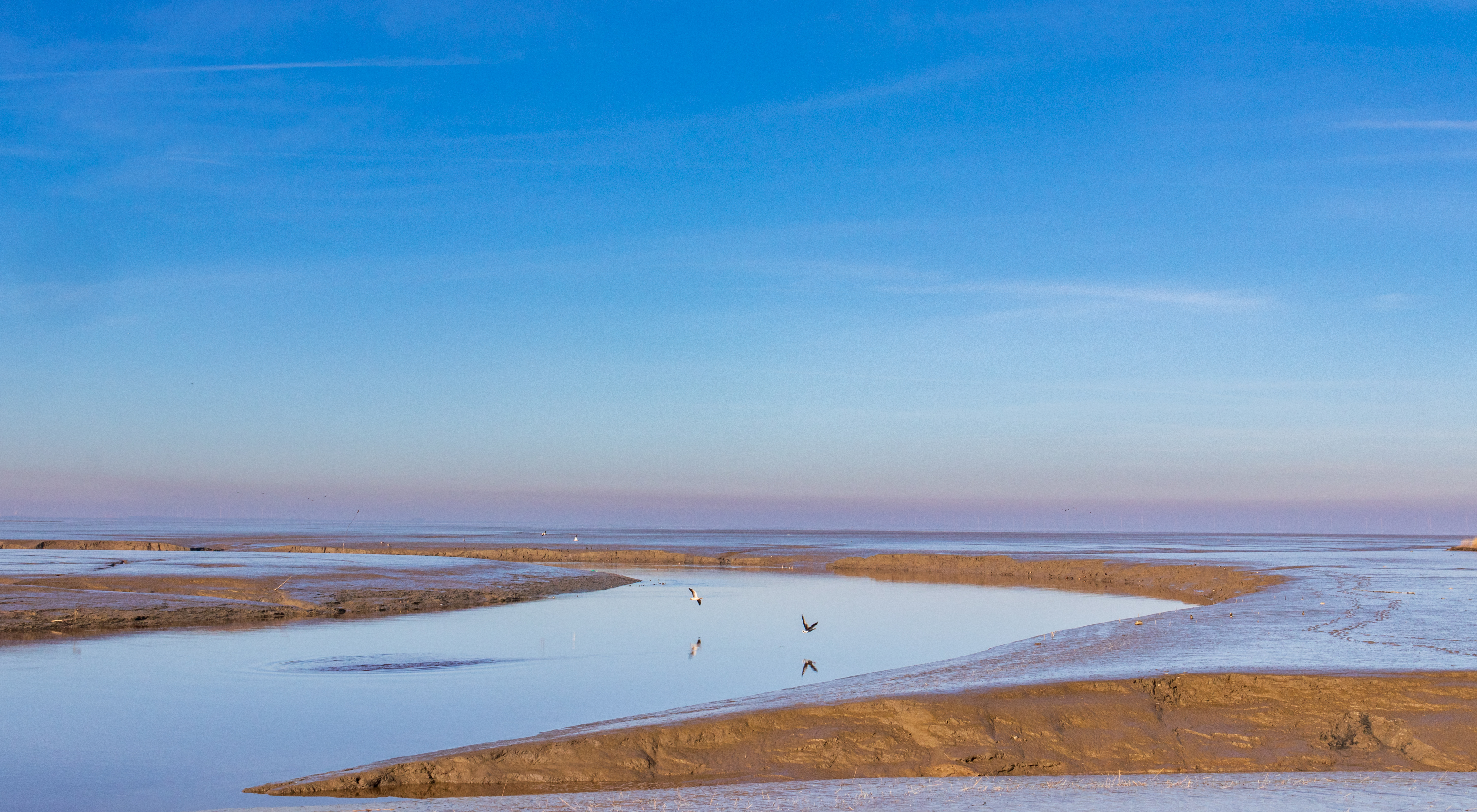 Ausblick vom Kiekkaaste in Nieuwe Statenzijl auf den Nationalpark Niedersächsisches Wattenmeer